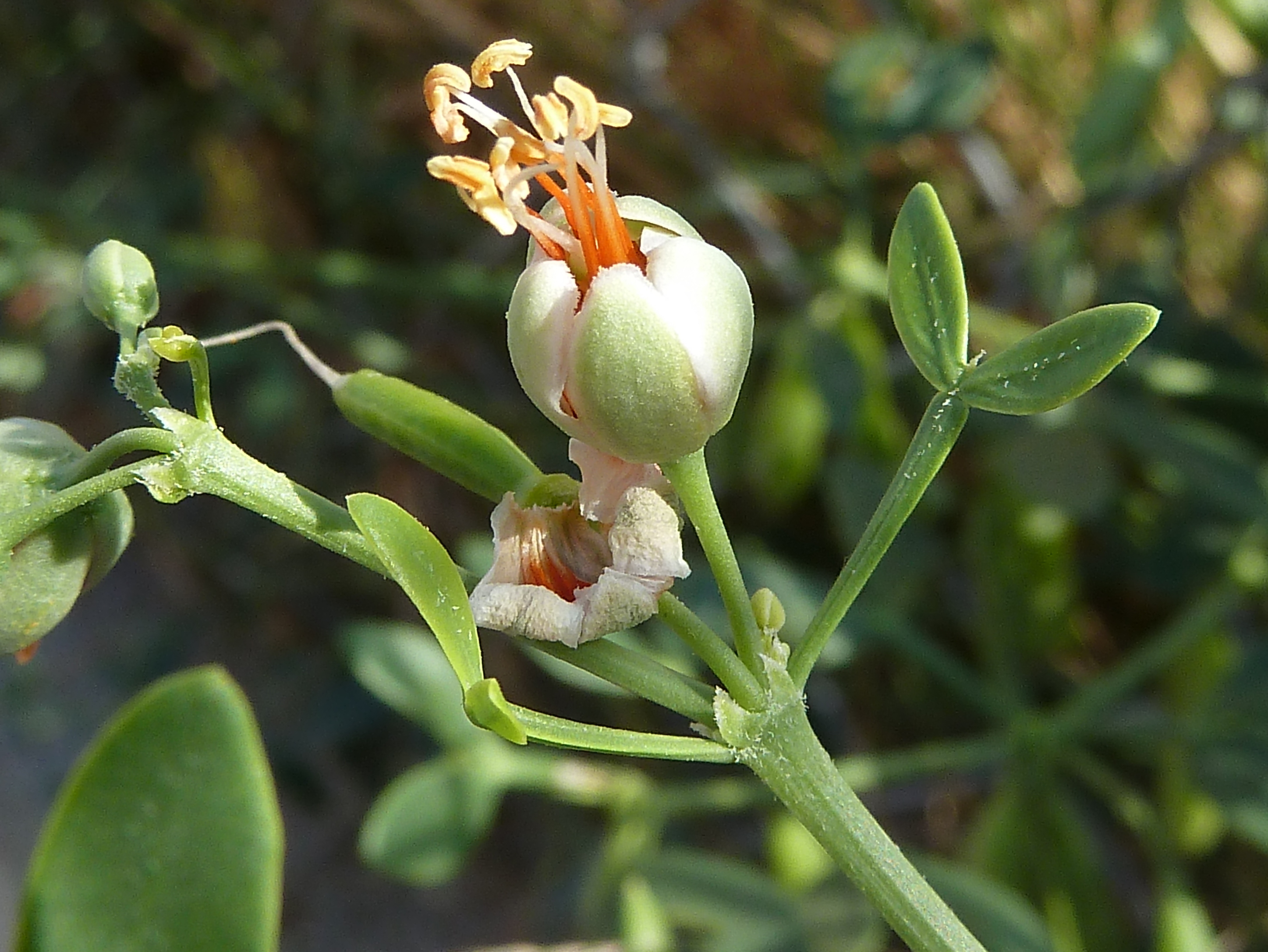 Zygophyllum fabago (Morsana) : Flor, hojas bifolioladas y pedúnculos con sus estipulas - Calle de Antonio Maldonado Tápia, Águilas (Murcia, España).